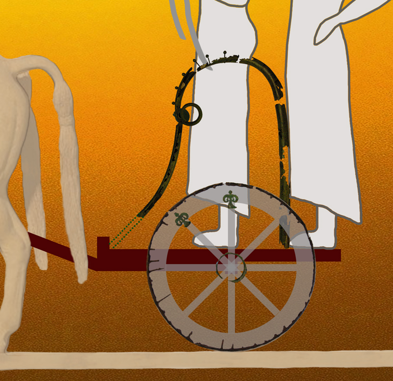 Carro a due ruote (currus). La struttra era in legno. Le ringhiere erano rivestite di lamine in bronzo, così pure i raggi delle ruote e i mozzi. I cerchioni delle ruote erano in ferro.